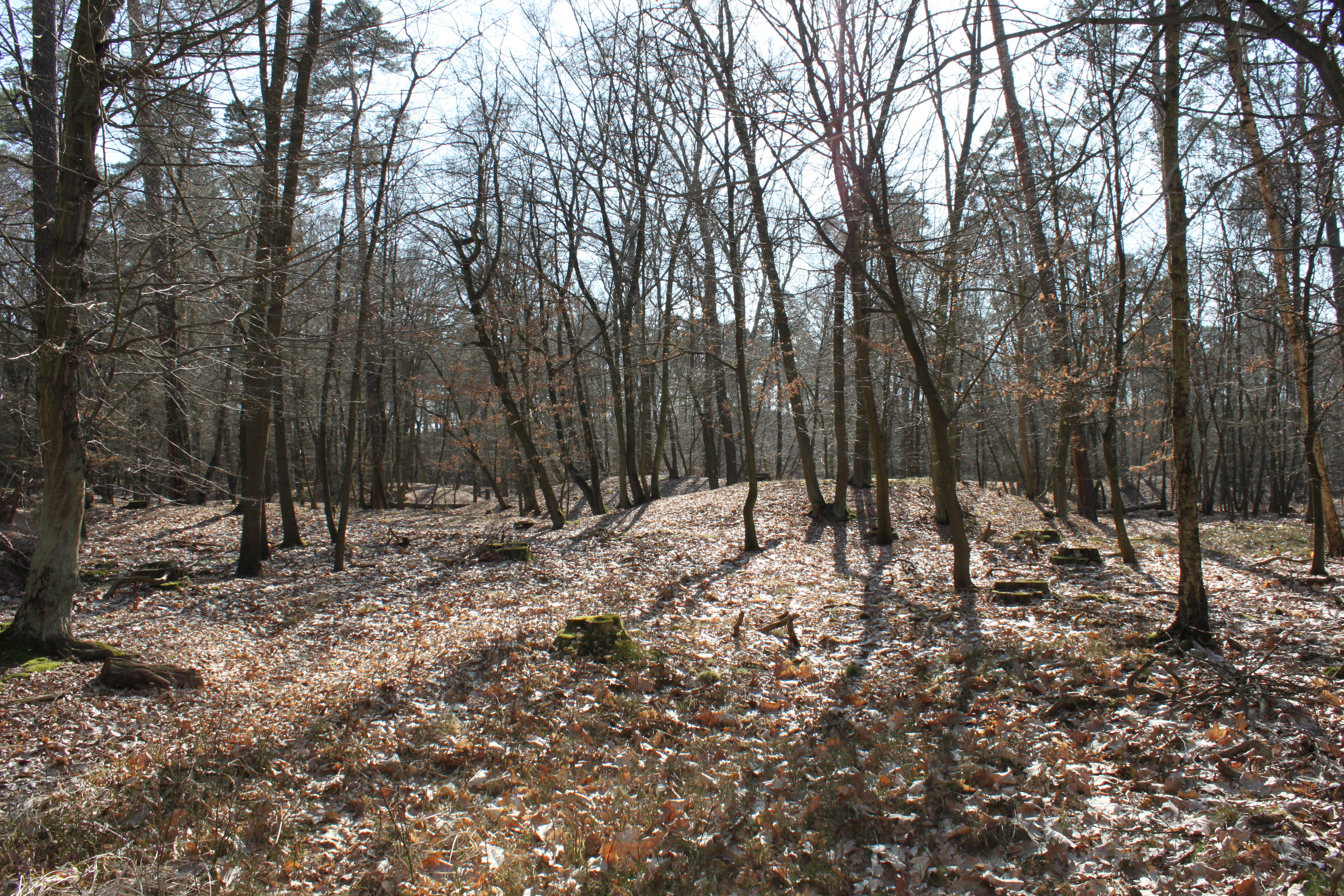 Das Hügelgräberfeld „Schweinert“ ist eines der bedeutendsten bronzezeitlichen Hügelgräberfelder in Mitteleuropa